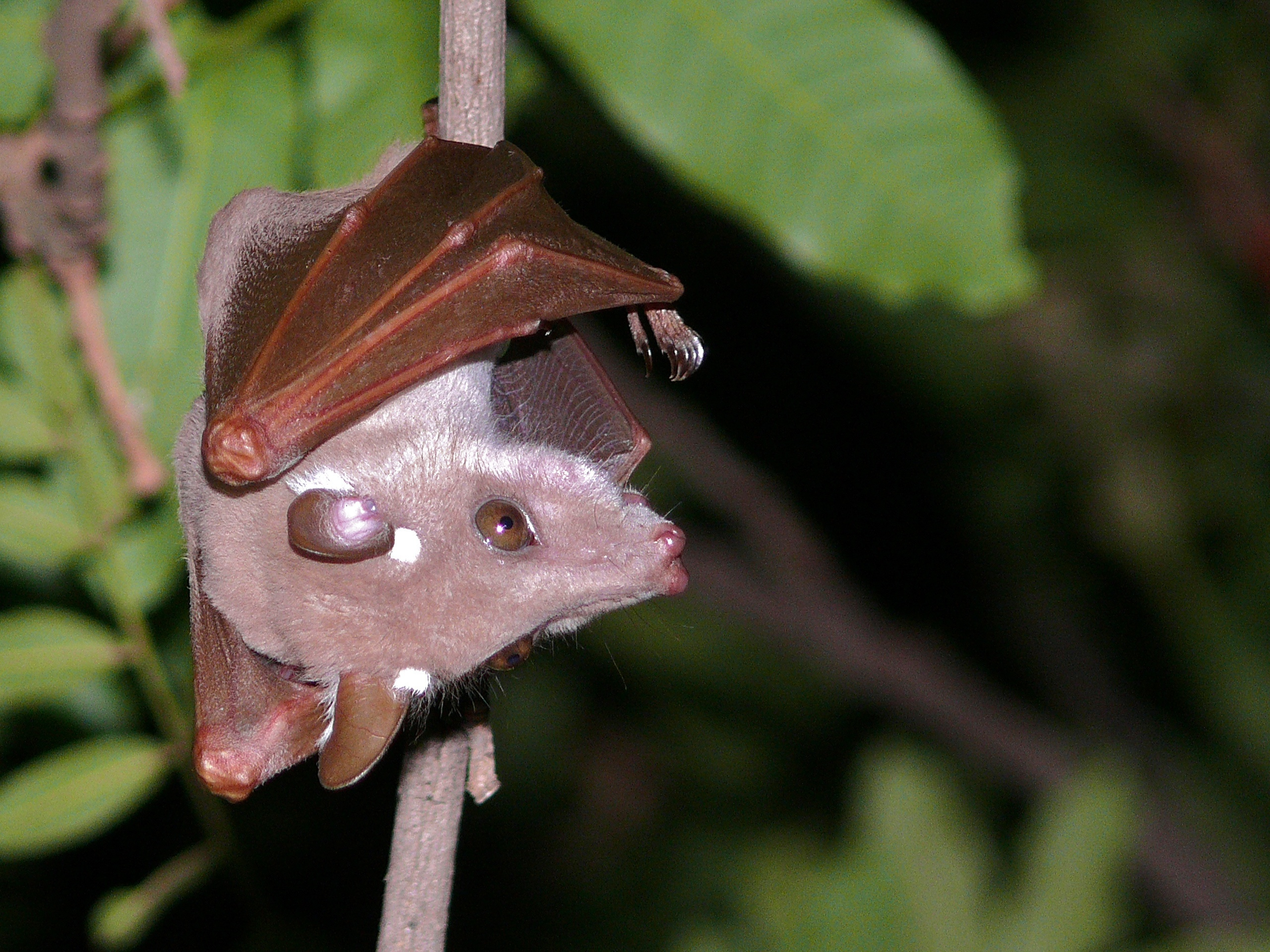 Letaba Camp, Kruger NP, SOUTH AFRICA